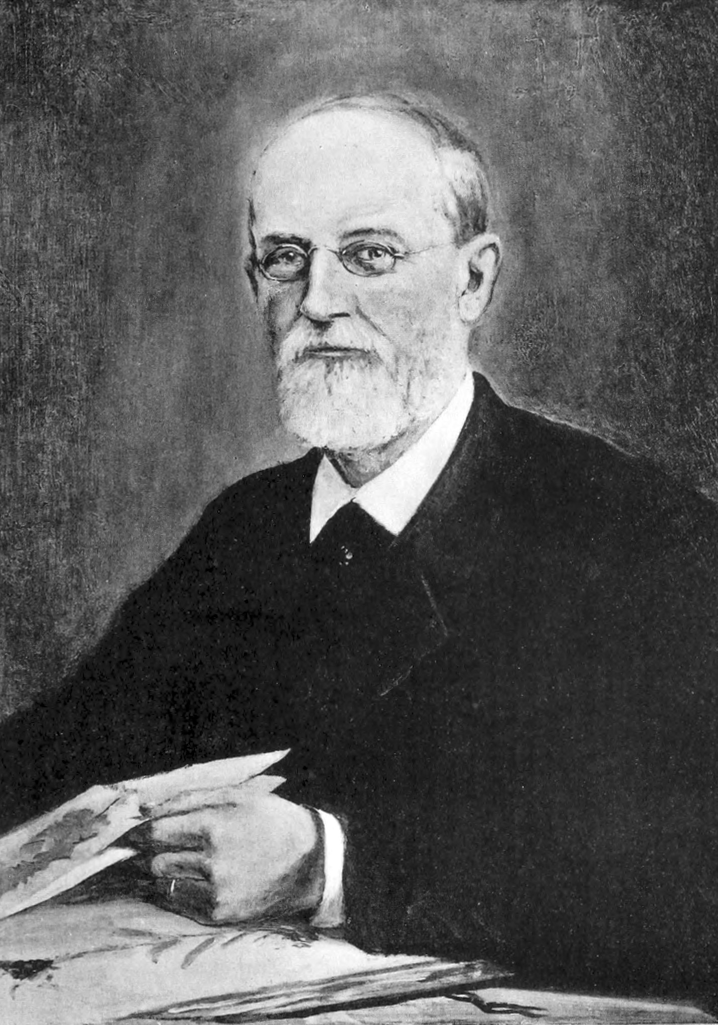 Oskar Theodor Sandahl (1829-1894)